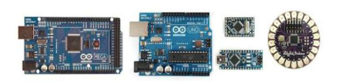 Arduion type